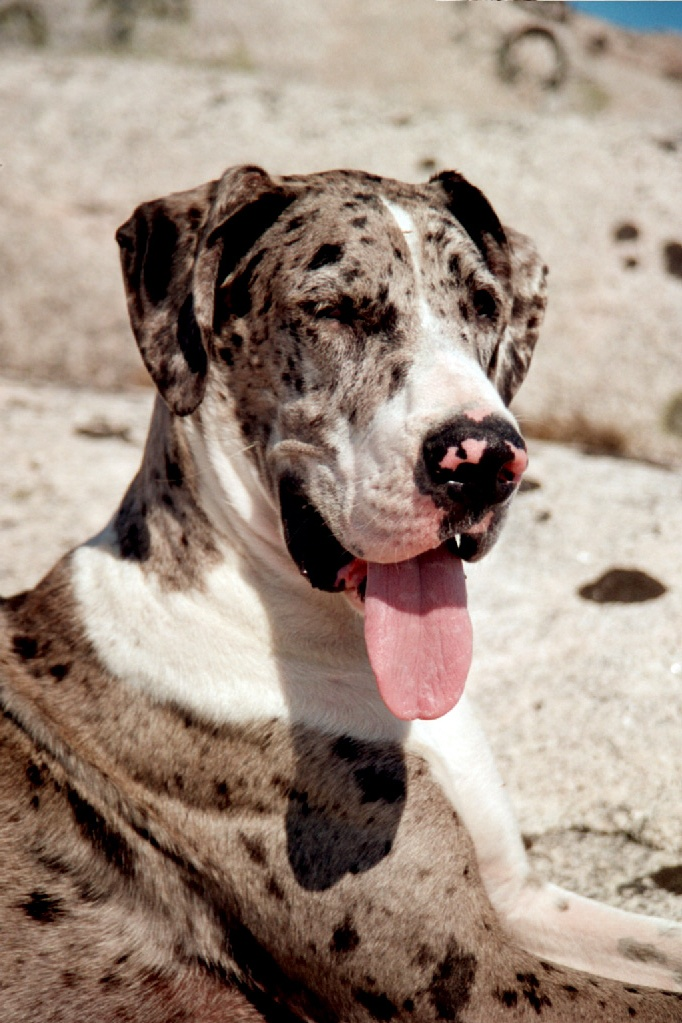 Merle, mantled merle